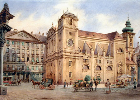 Blumenstände auf der Freyung mit Blick auf das Schottenstift und die Schottenkirche Aquarell auf Papier monogrammiert 17,5 x 24,5 cm